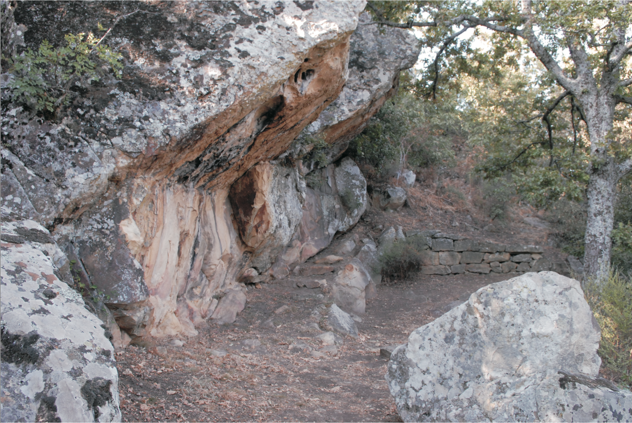 Riparo Ranaldi - Filiano (PZ); pitture rupestri; 29 agosto 2007, N40.82574°E15.78507; fonte/copyright: Mimmo Gruosso